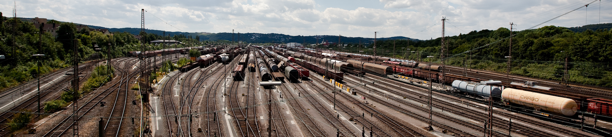 Rangierbahnhof in Vorhalle 2009/06/12